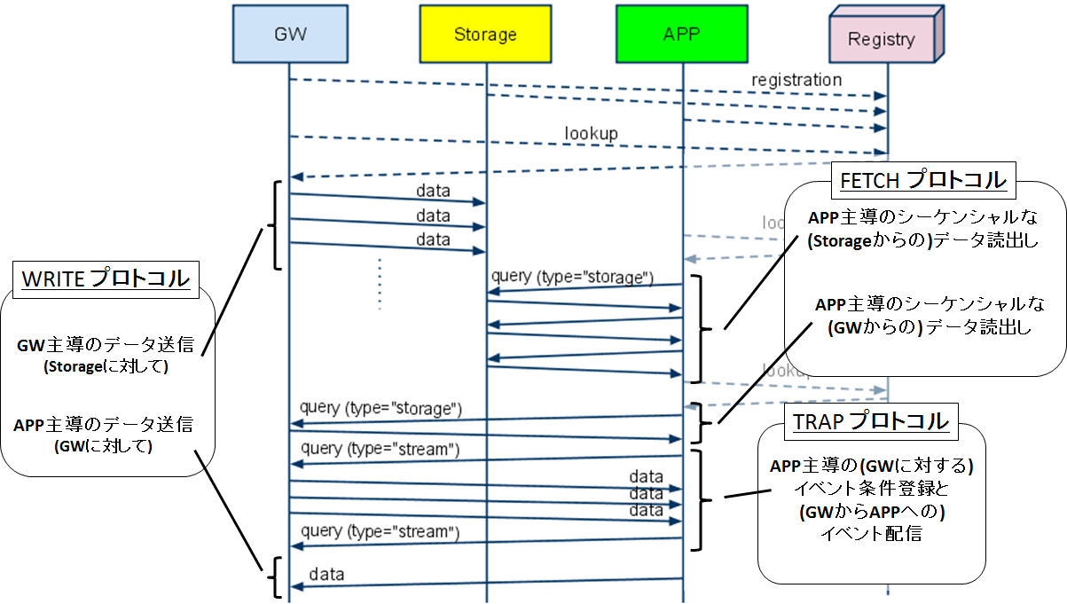 IEEE1888 Component-to-Component通信シーケンス図